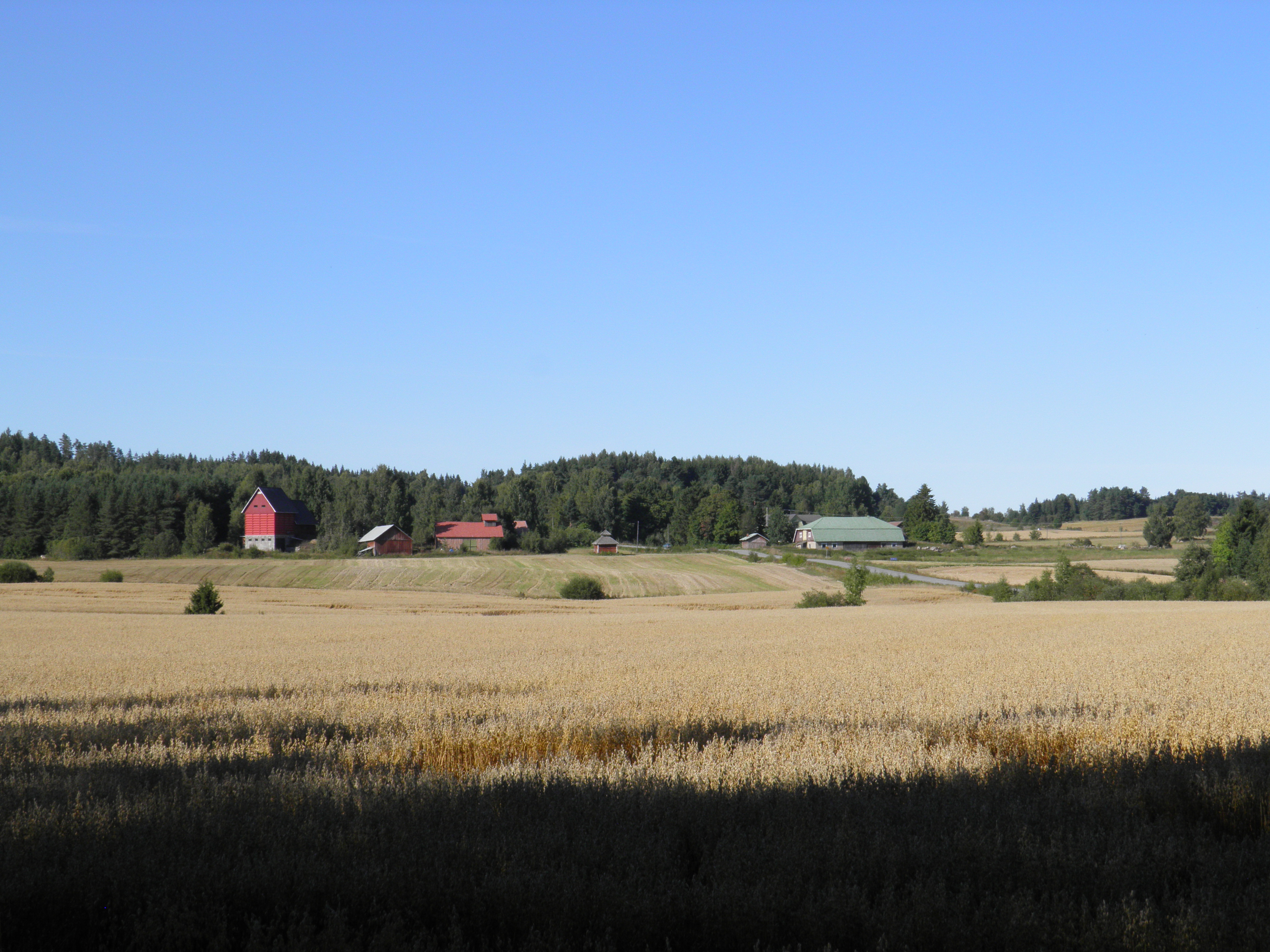 Viitailan kylää Asikkalassa kylän eteläpuolelta nähtynä.